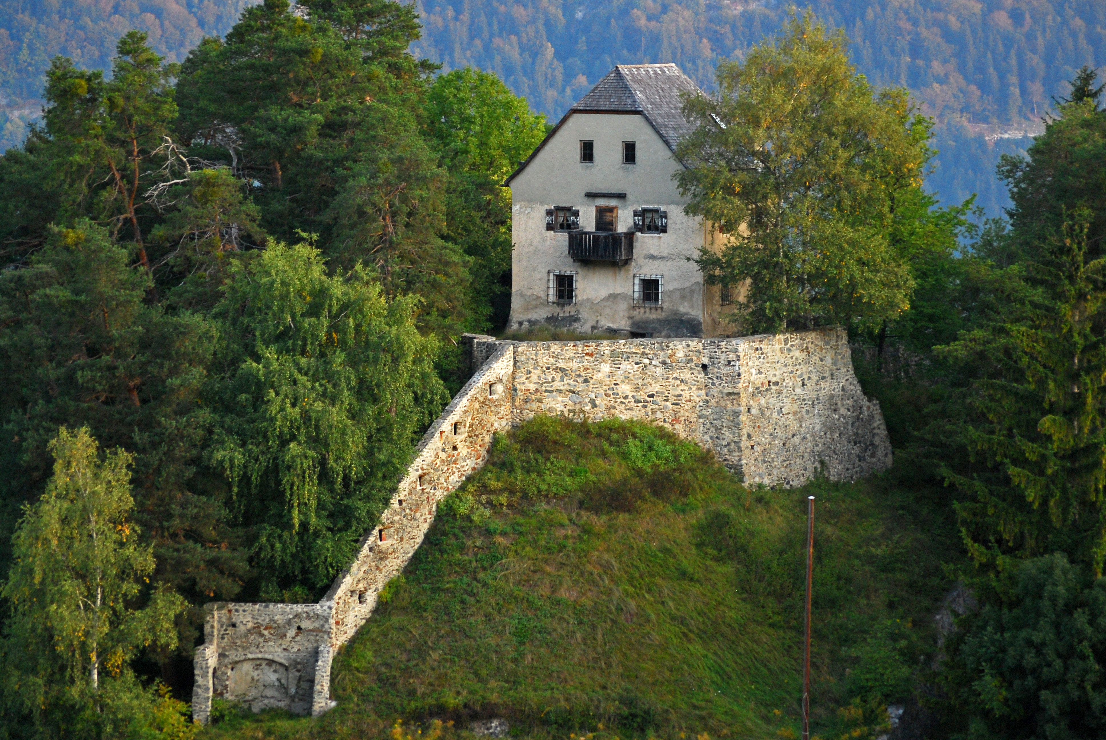 Burgruine Vellenberg This media shows the remarkable cultural object in the Austrian state of Tyrol listed by the Tyrolean Art Cadastre with the ID 35665. (on tirisMaps, pdf, more images on Commons, Wikidata)